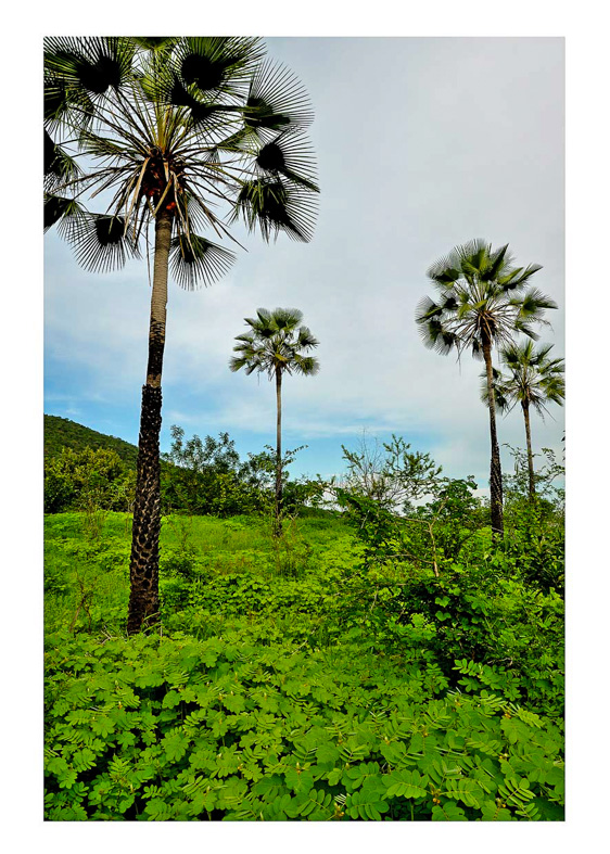 Descrição_para_sua_foto